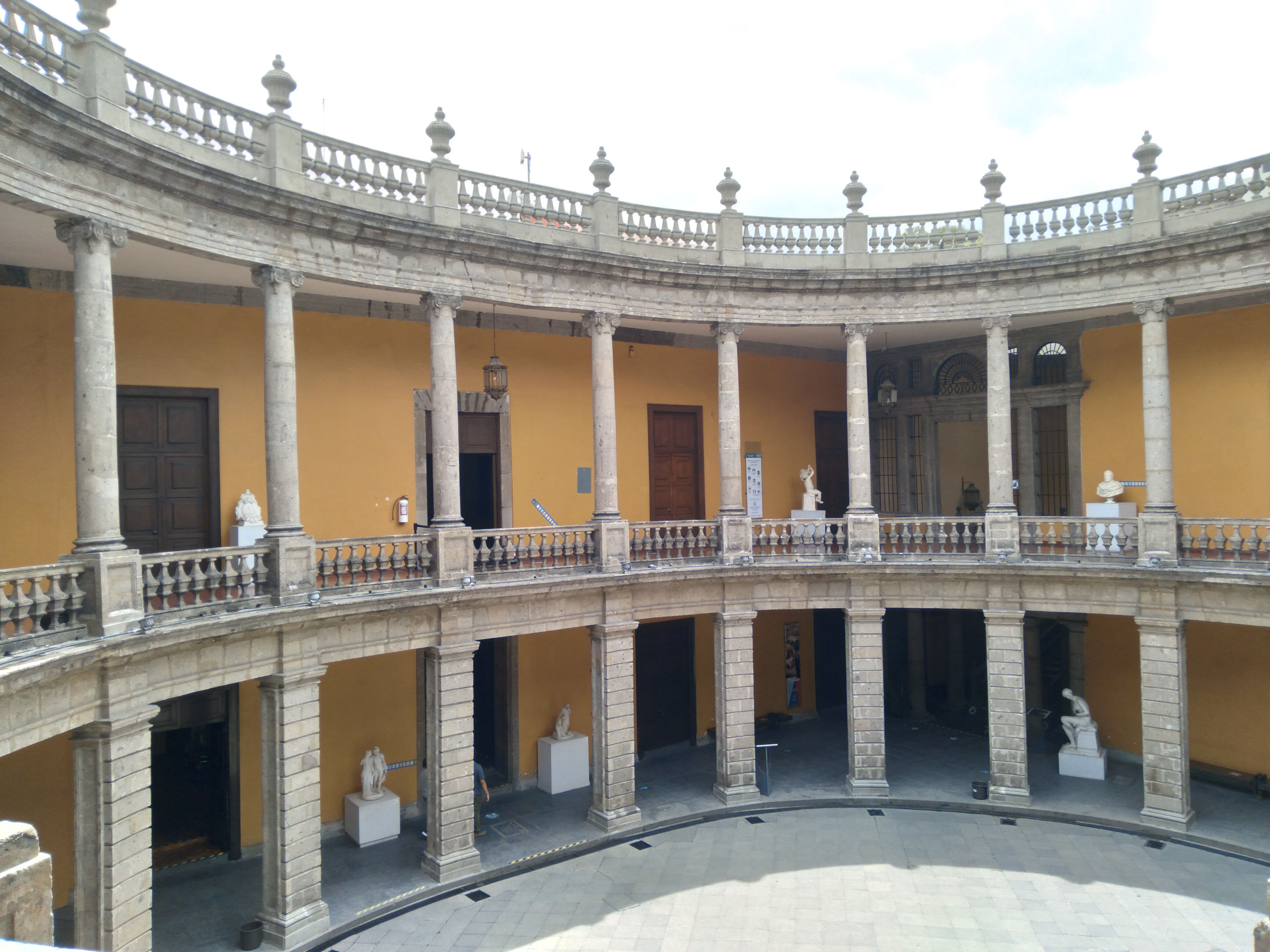 Museo Nacional de San Carlos, pátio oval